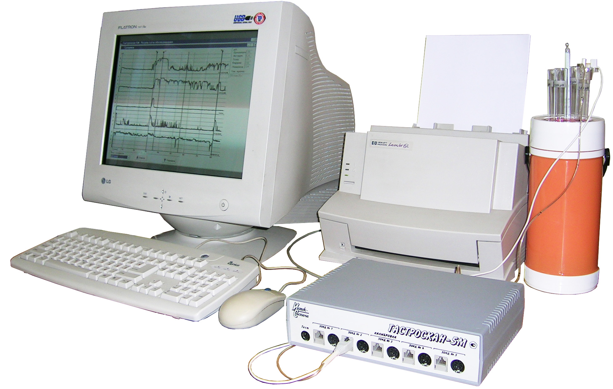 Acidogastrometr